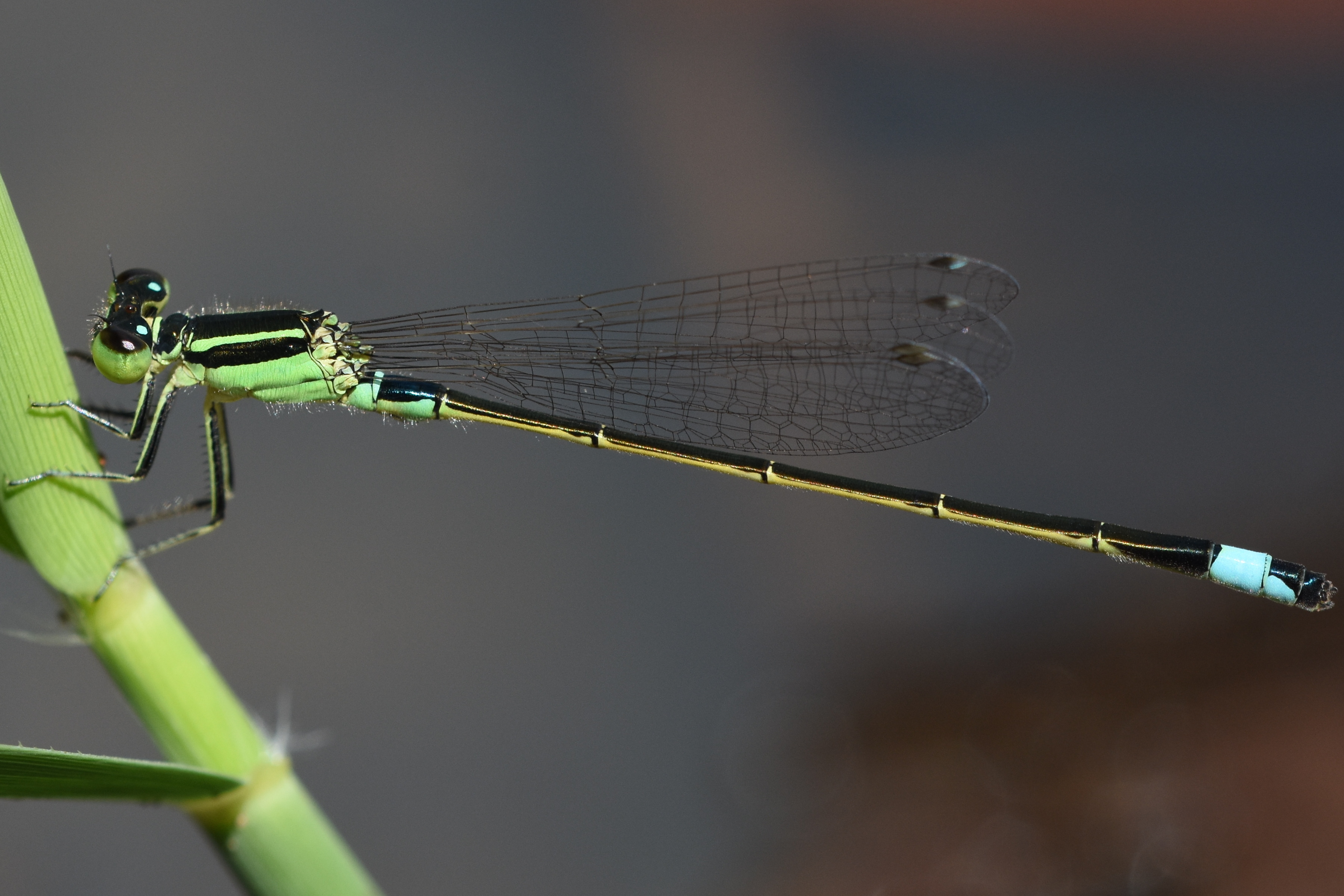 アオモンイトトンボ雄 広島県